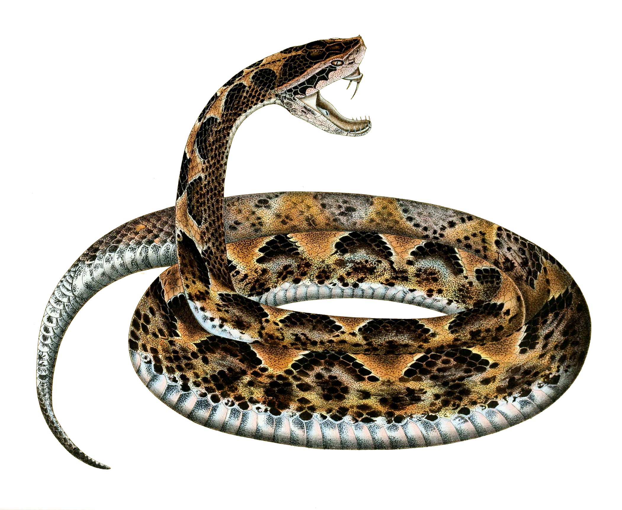 Calloselasma rhodostoma